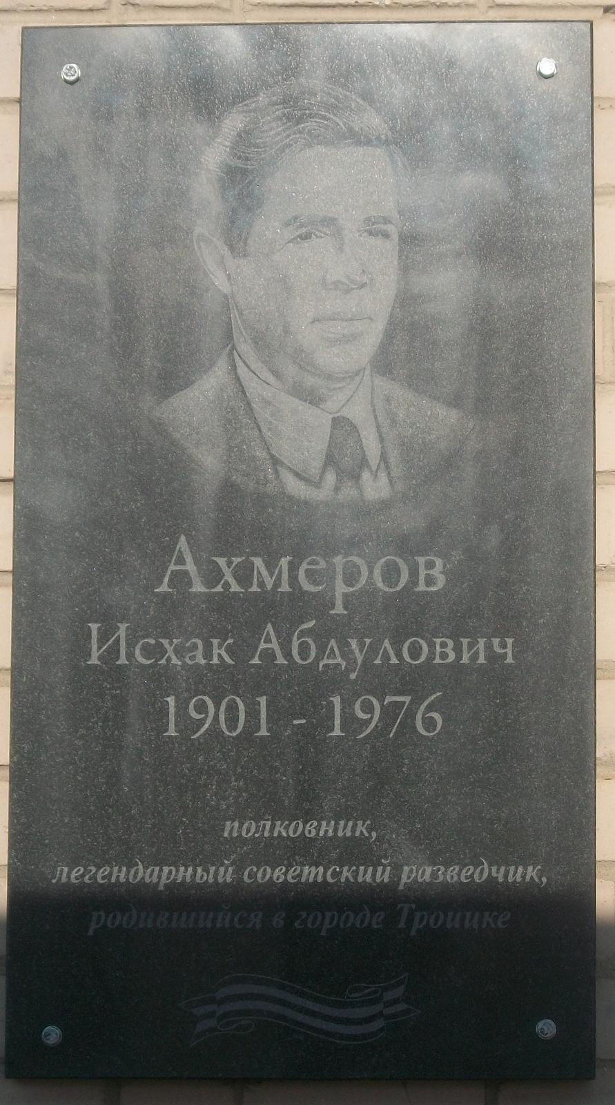 Мемориальная доска посвященная И.А.Ахмерову.